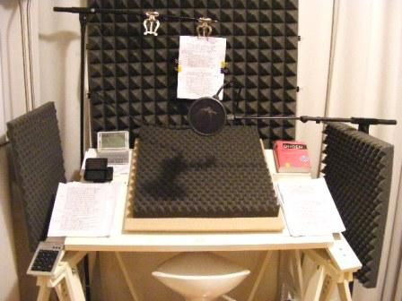 Visuelle Beschreibung